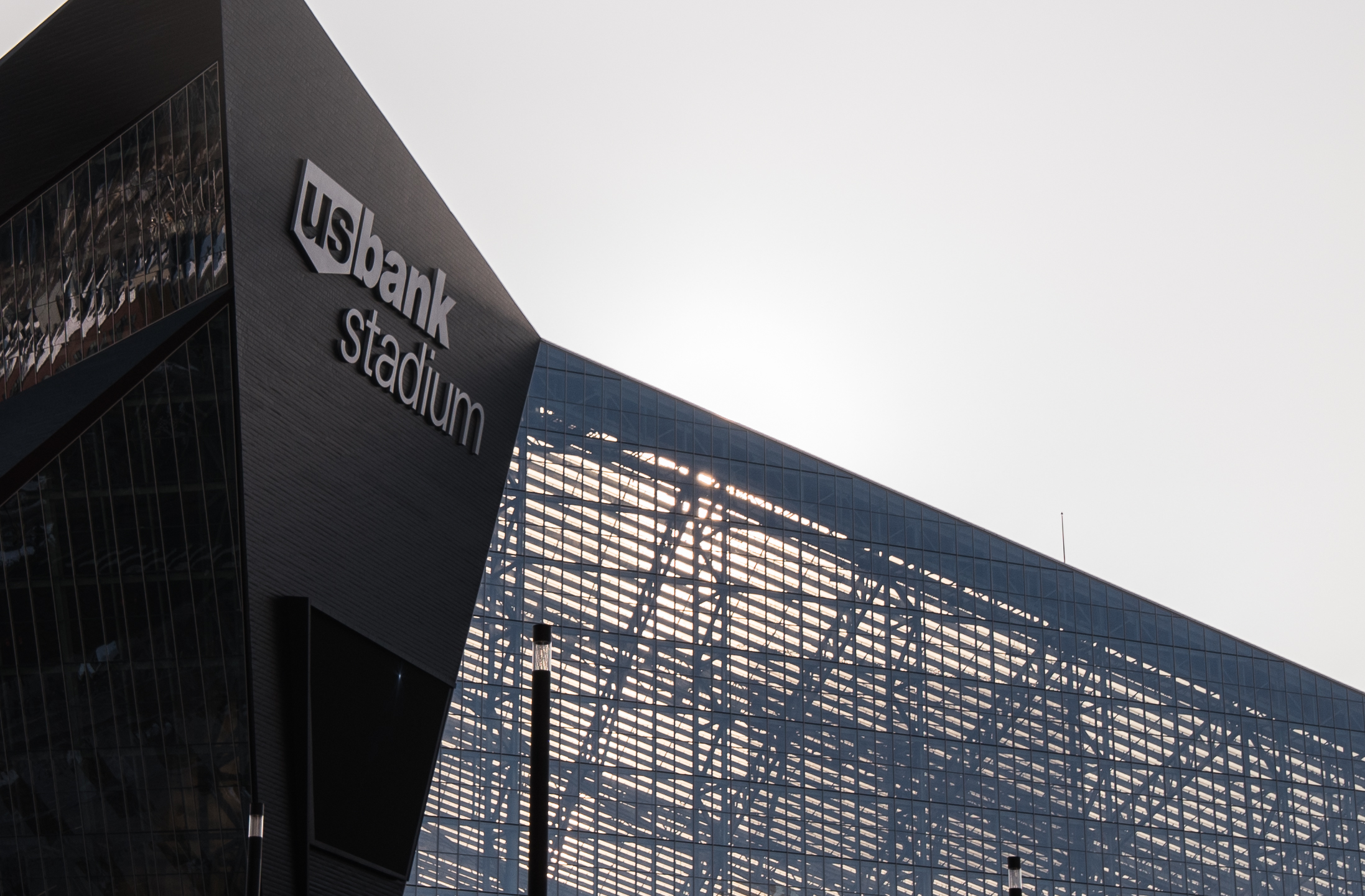 U.S. Bank Stadium in Minneapolis, Minnesota.